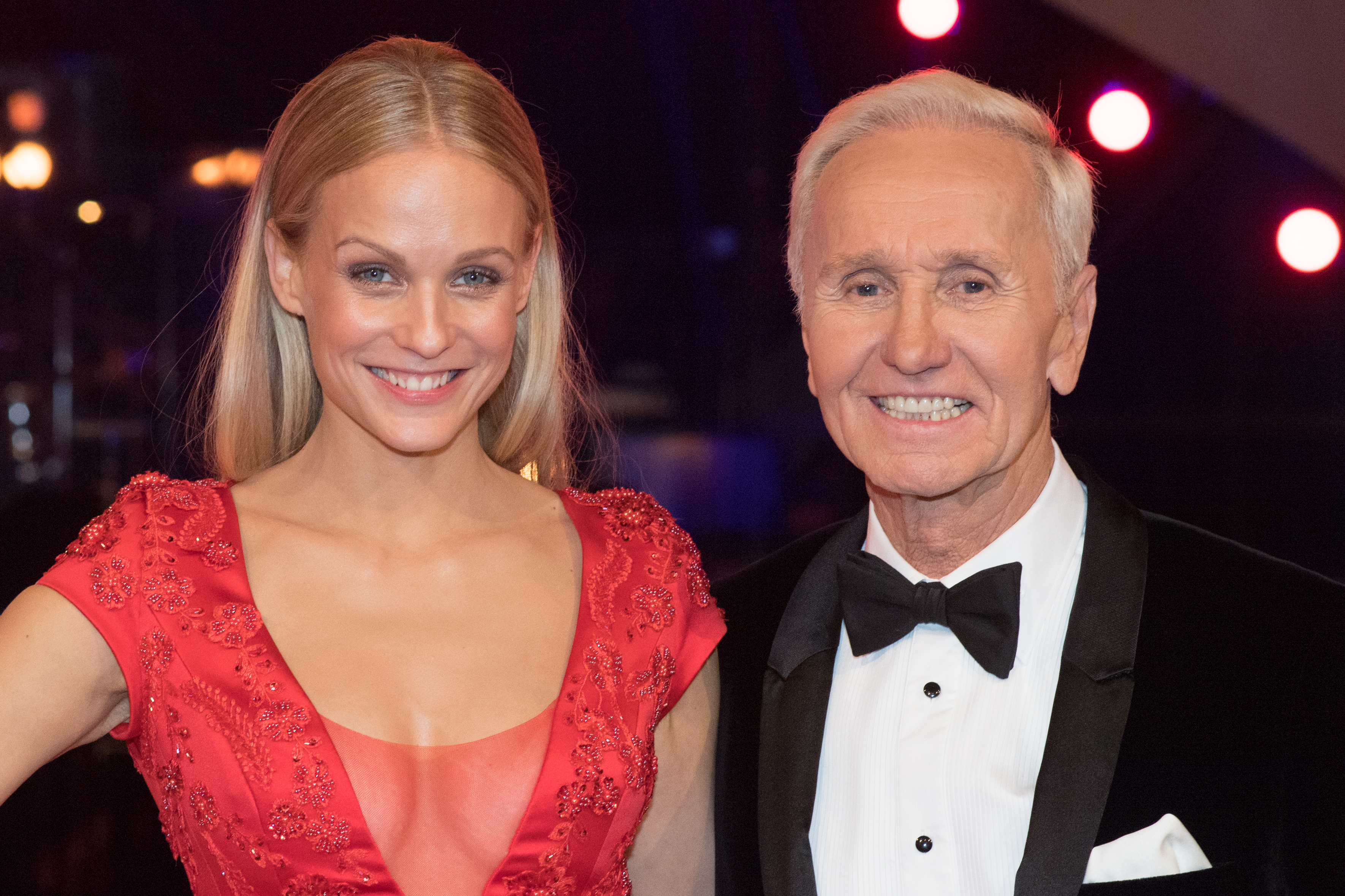 Wien, 15. März 2019: ORF Dancing Stars, 1. Folge - Bild zeigt Moderatoren Mirjam Weichselbraun und Klaus Eberhartinger.